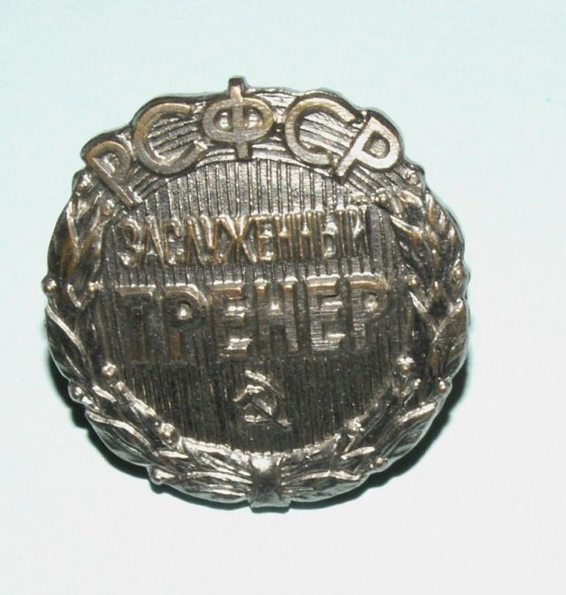 Знак к почётному спортивному званию «Заслуженный тренер РСФСР»